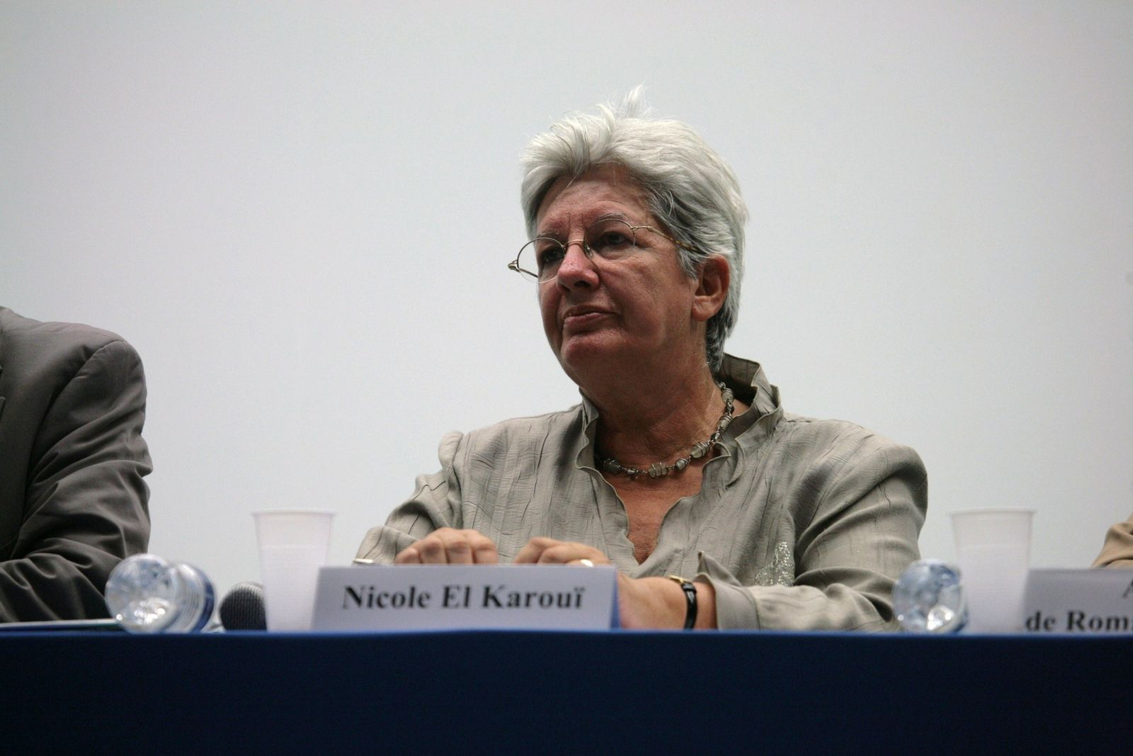 Nicole El Karaoui à la conférence du MEDEF 2008